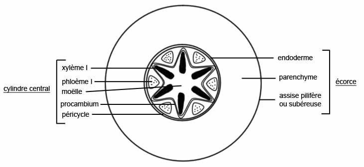 Schéma d’une coupe transversale de racine, avec structures primaires uniquement.